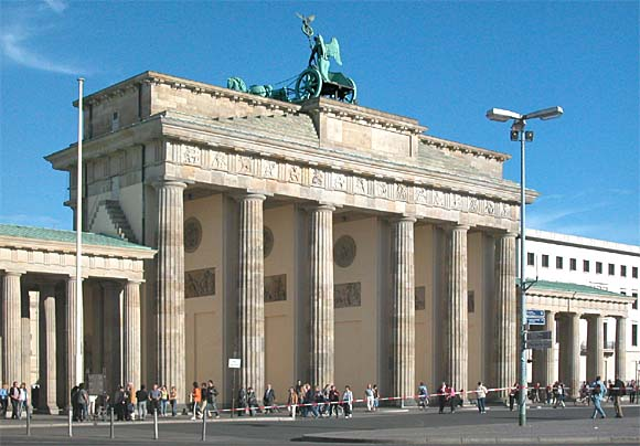 Berlin Brandenburger Tor 2004 09 17